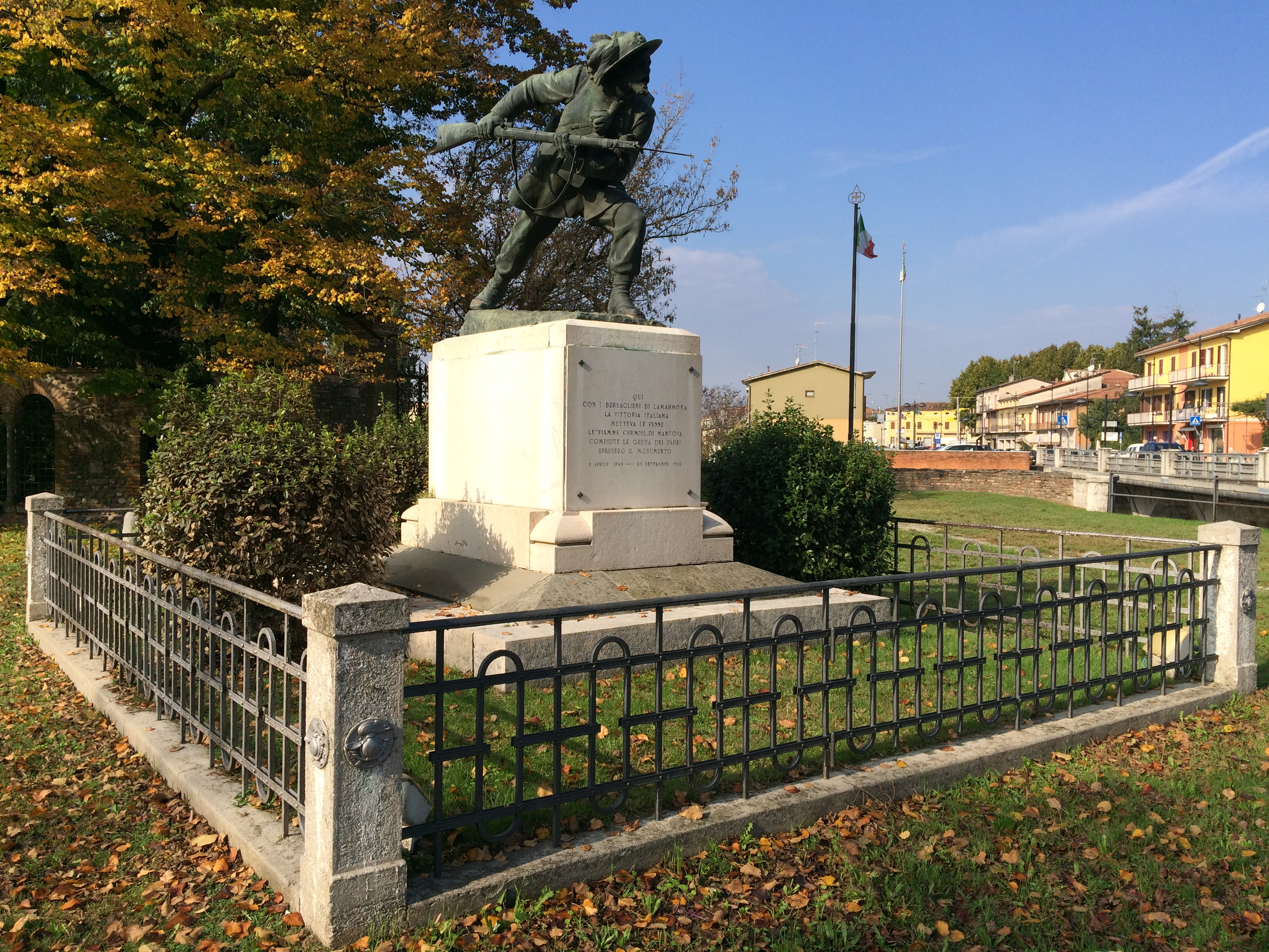 Monumento al Bersagliere a Goito, provincia di Mantova.